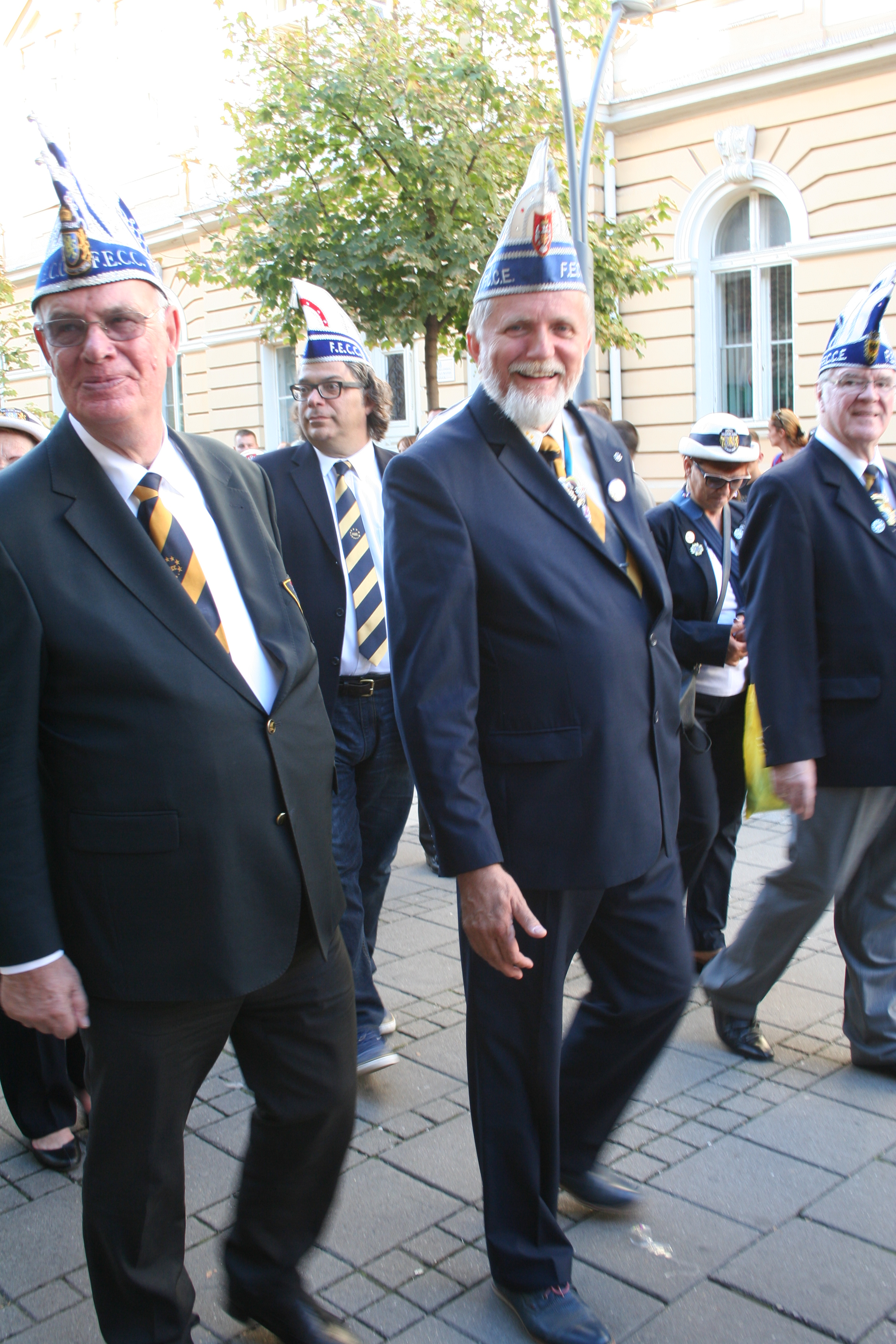 Šabac, Čivijada i dečiji karneval